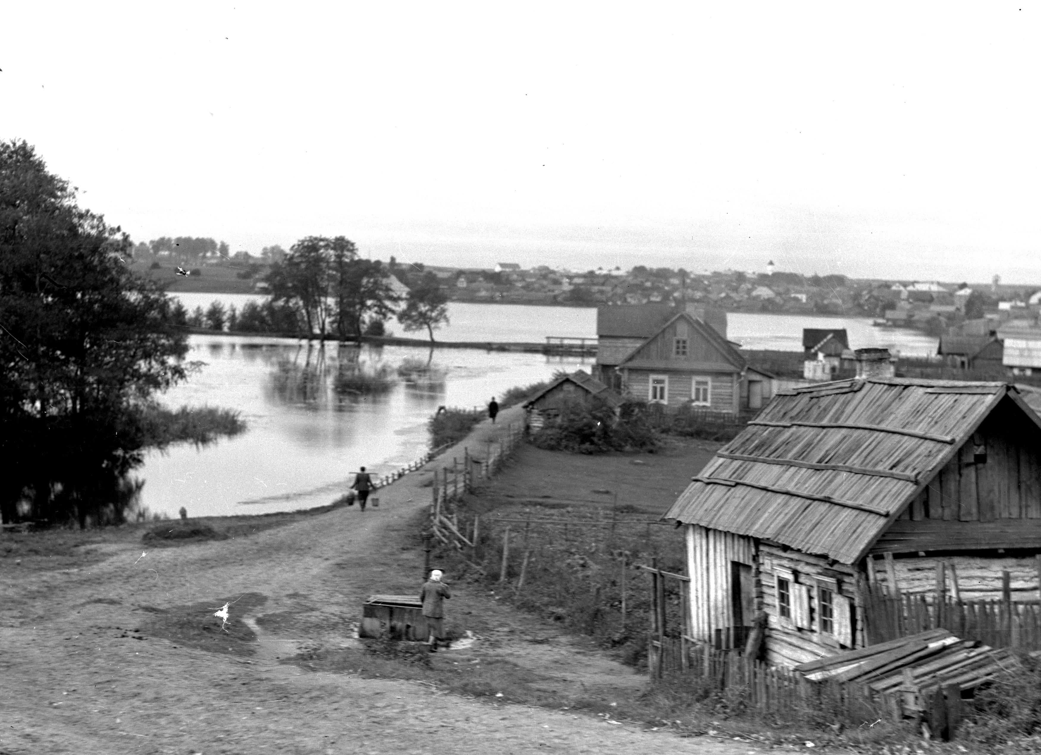 Беларуская (тарашкевіца): Глыбокае (Hłybokaje), возера Кагальнае (Kahalnaje)